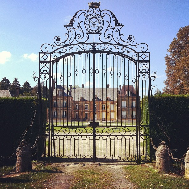 Château de Guignicourt sur Vence, Portail